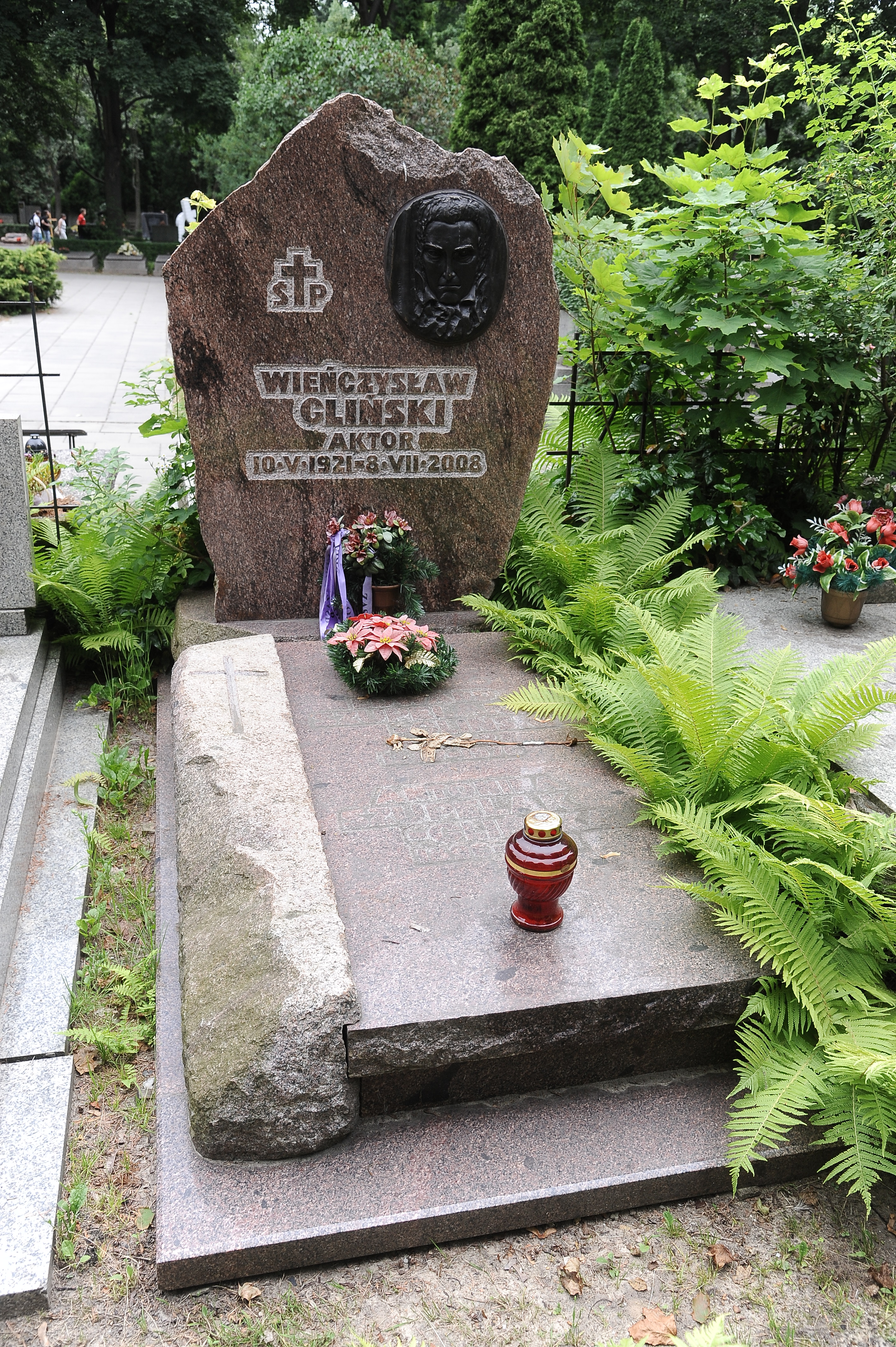 Grób Wieńczysława Glińskiego na warszawskim Cmentarzu Wojskowym na Powązkach